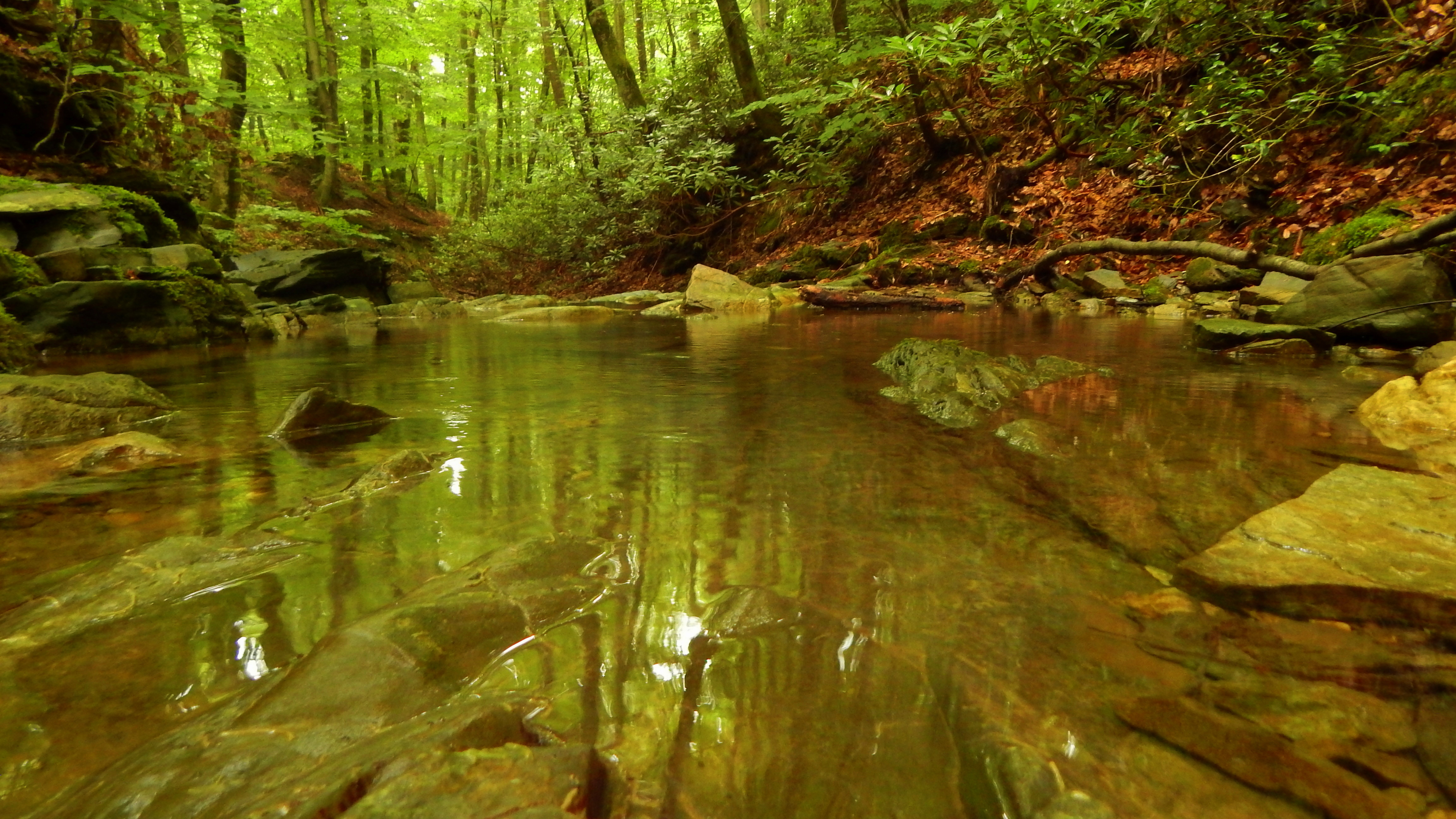 Силкосия